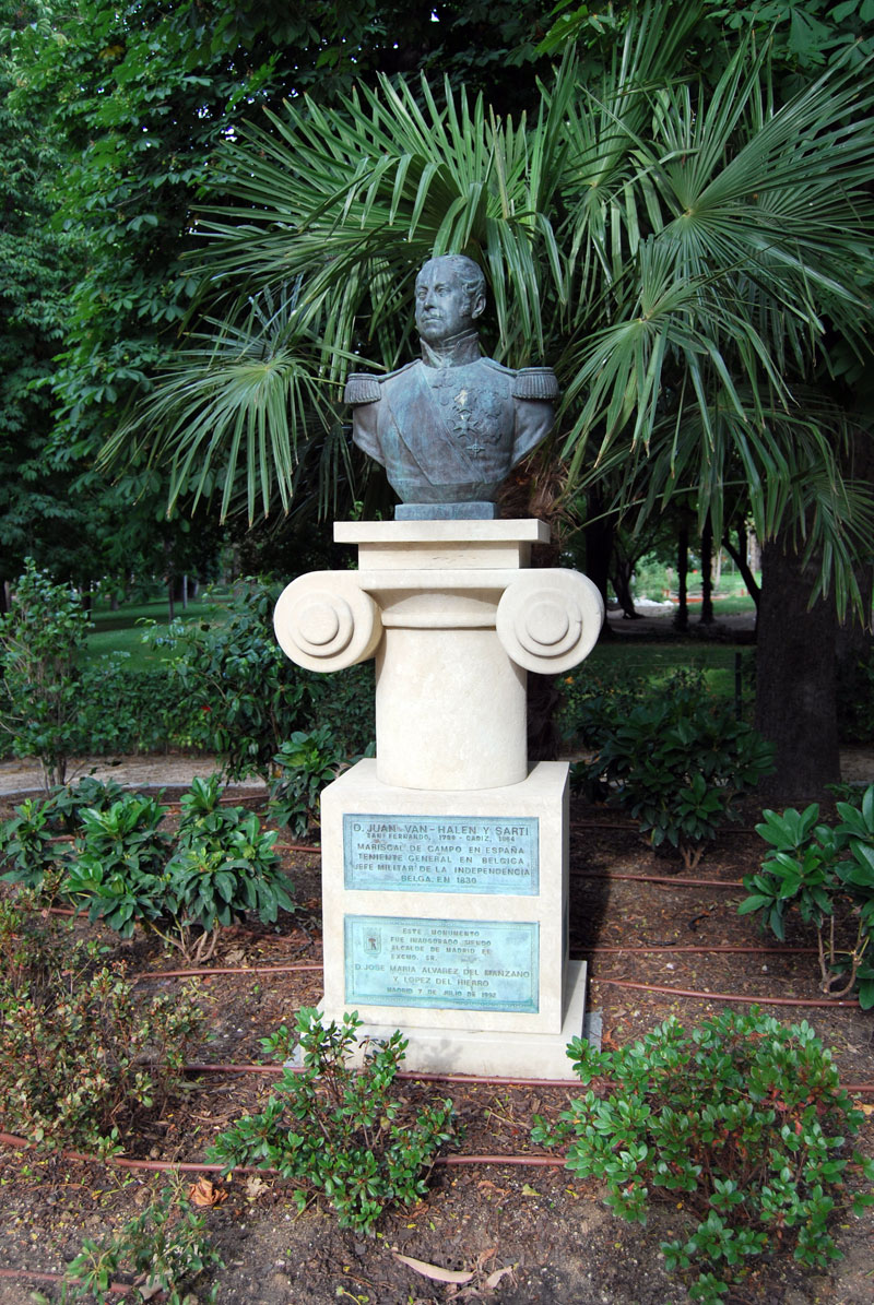 Estatua del militar español Juan Van Halen ubicada en los Jardines del Buen Retiro (Madrid).